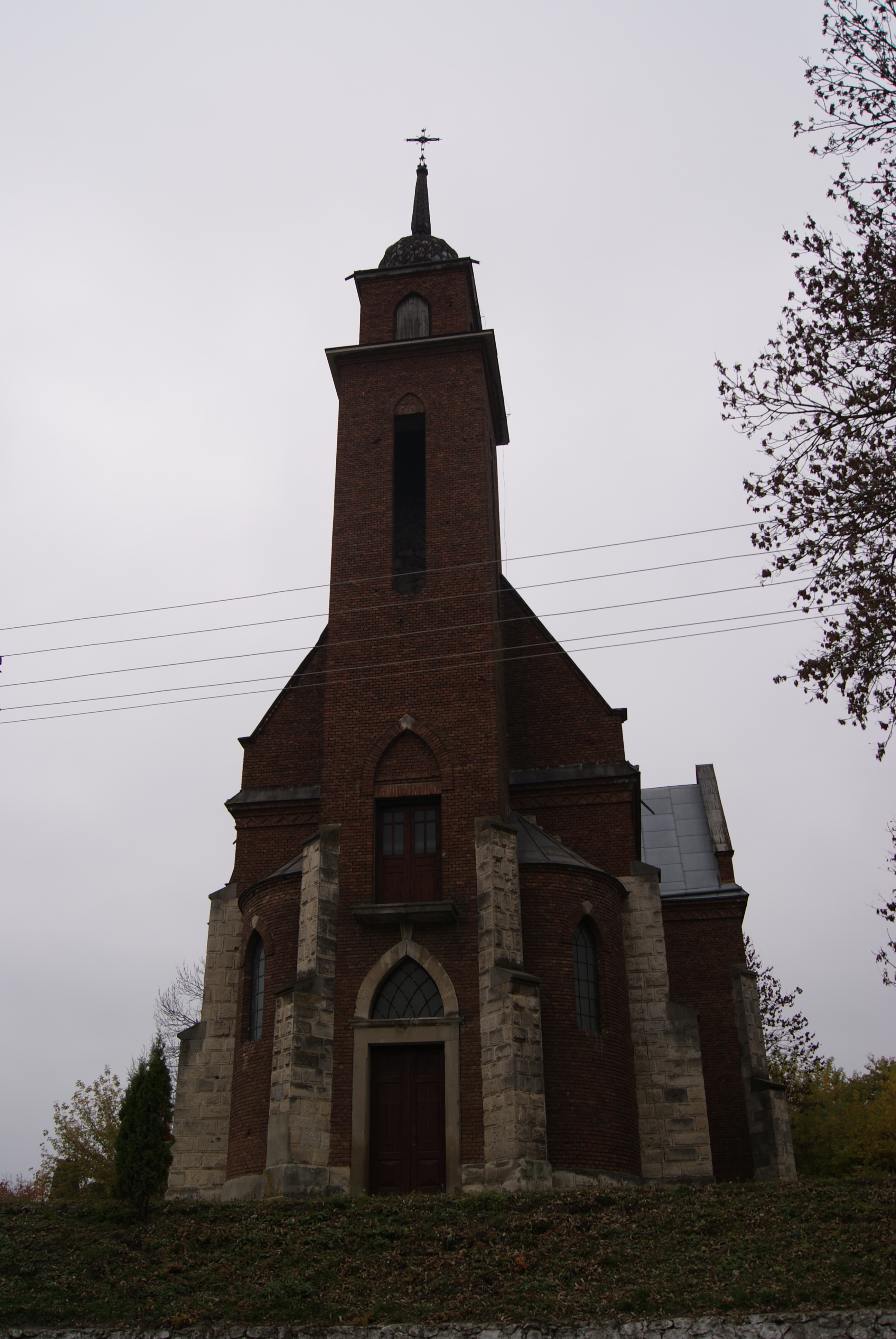 Костел в селі Хмелиськ